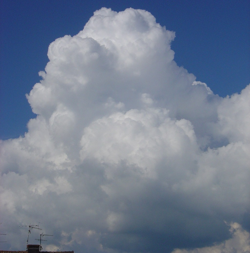 Cumulus congestus clouds